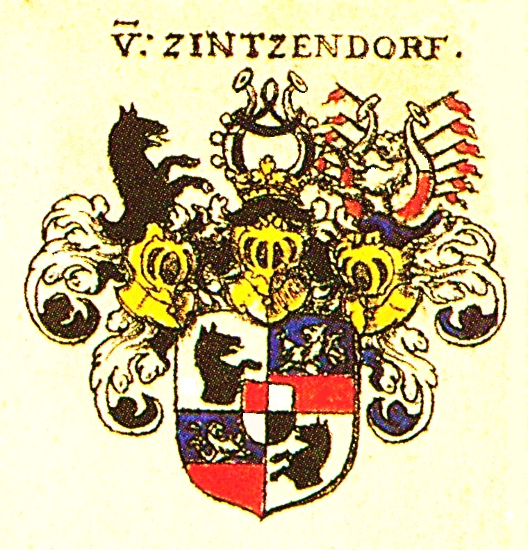 Wappen der reichsfreien Herren, späteren Reichsgrafen von Zinzendorf